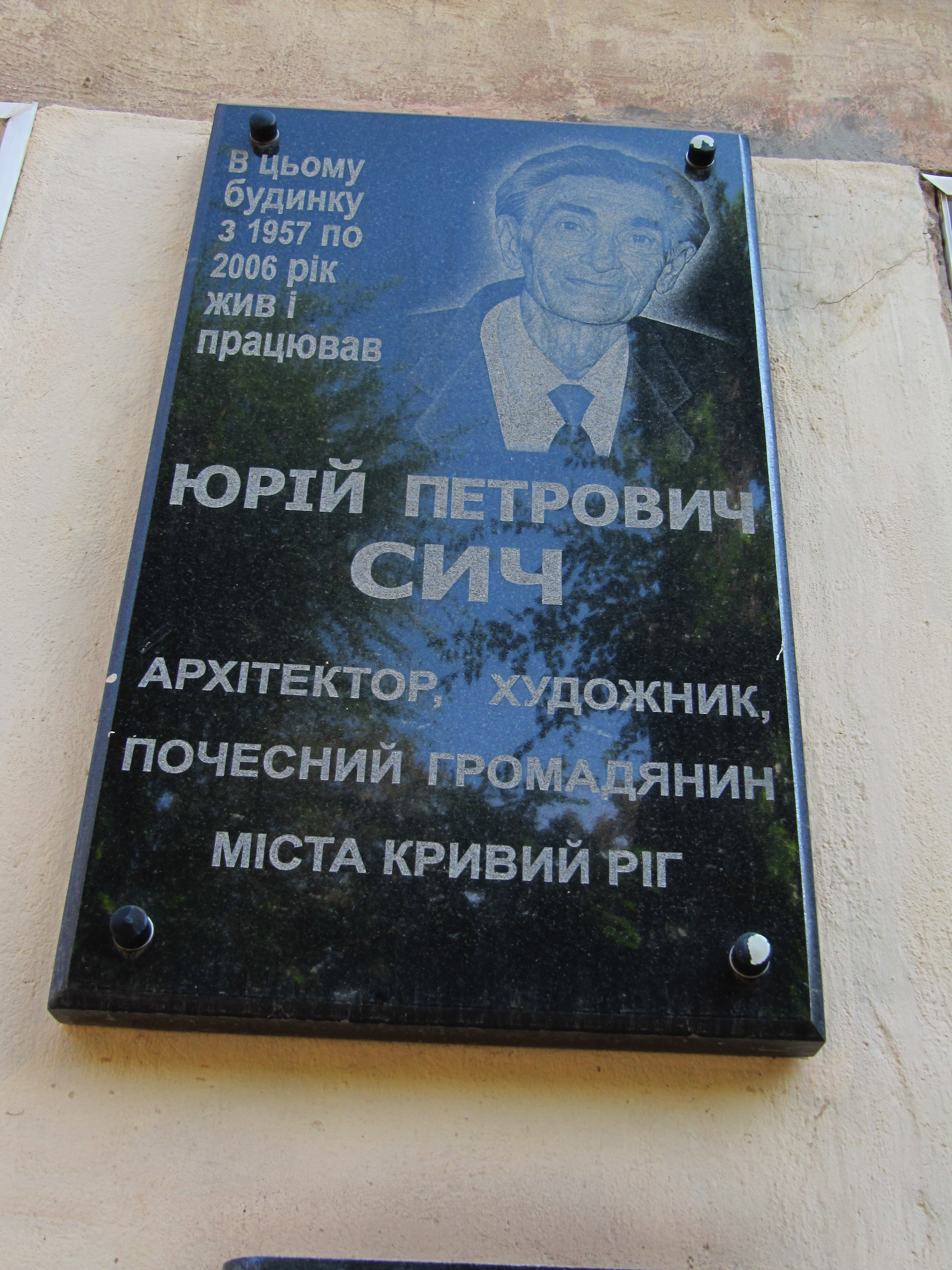 Житловий будинок («Будинок профессури»), Кривий Ріг, вул. Першотравнева, 11 Меморіальна дошка Сича Юрія Петровича, встановлена в 2015 році